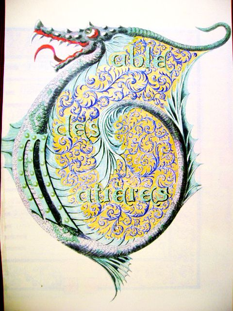 Photographie par Henri Goybet de la page table des matieres du livre de famille du Général Mariano Goybet (1898-1931). Oeuvre artistique enluminée de 200 pages numerotées.